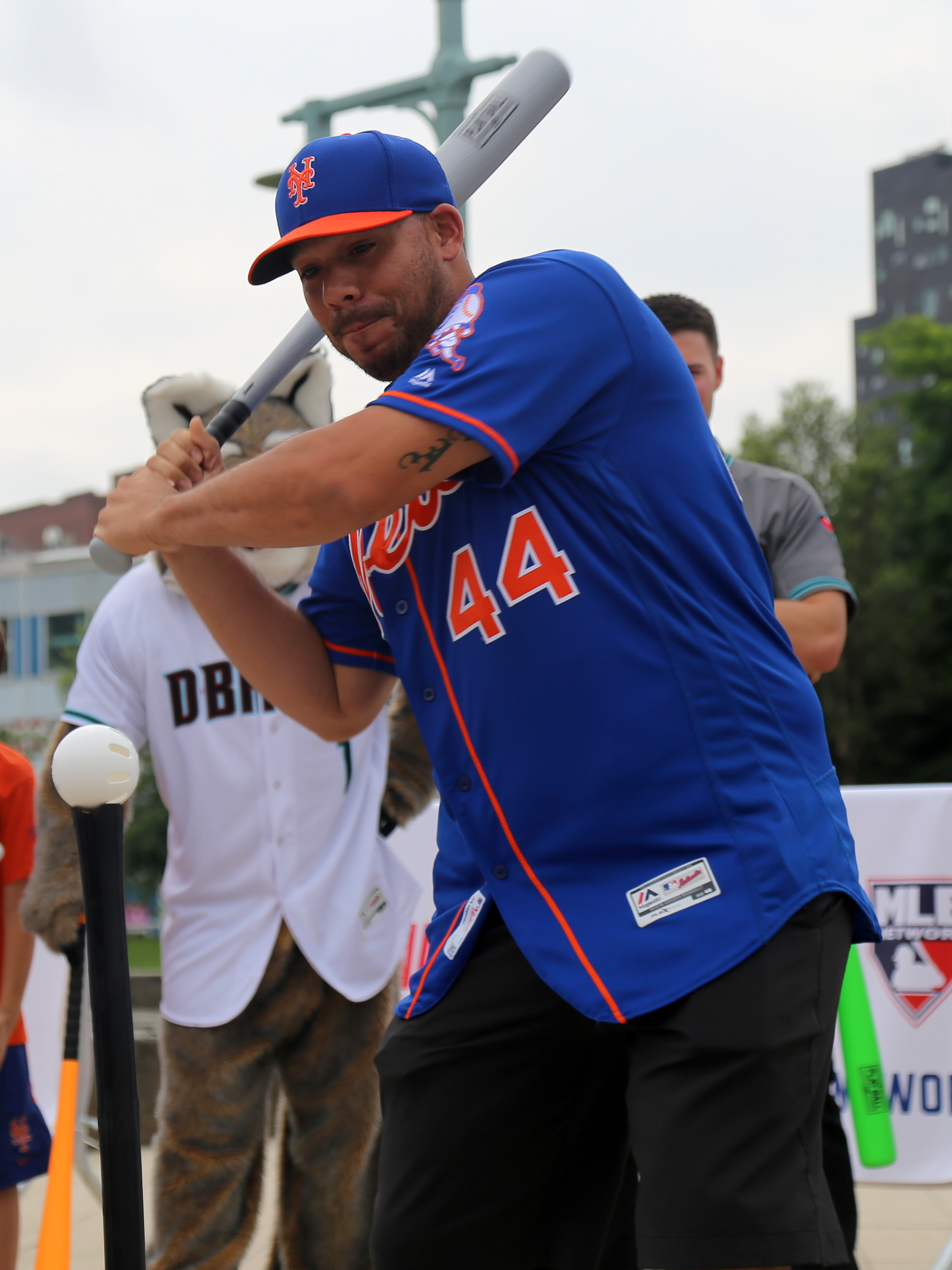 René Rivera